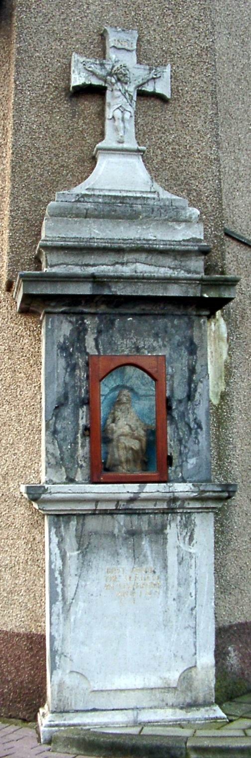 Wegkapelletje in de vorm van een cenotaaf met crucifix en schelpnisje, 1767. In de nis een pieta. Hoek Ten Esschen-Tervierenweg